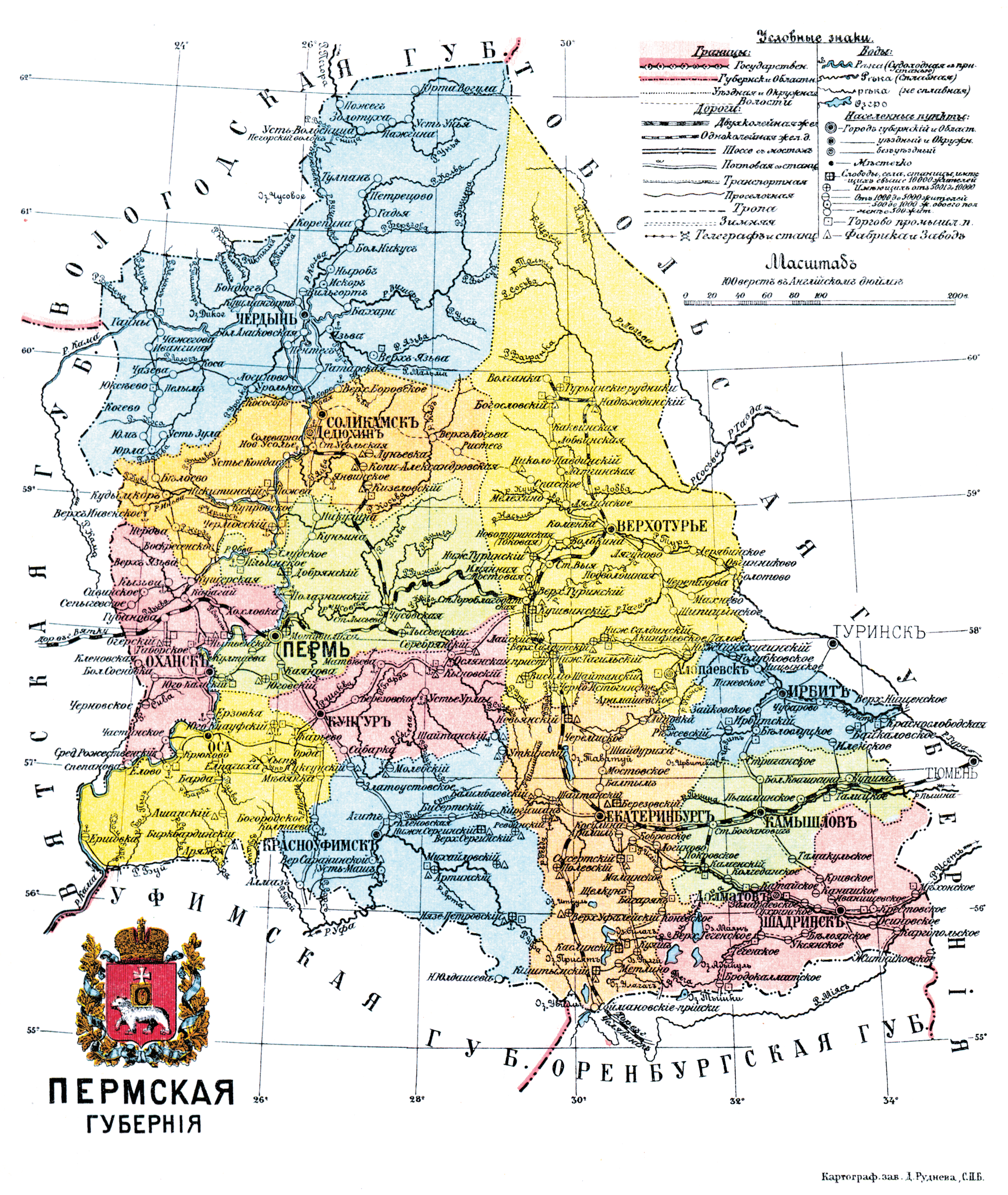 Карта Пермской губернии, 1913 год